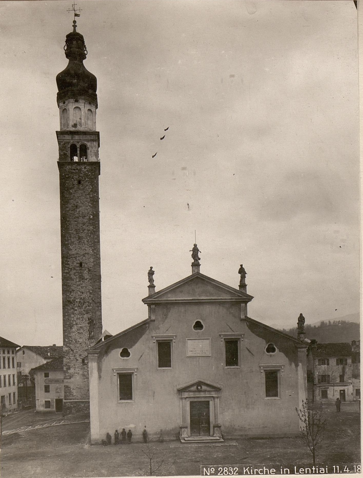 Kirche in Lentiai 11.4.18.